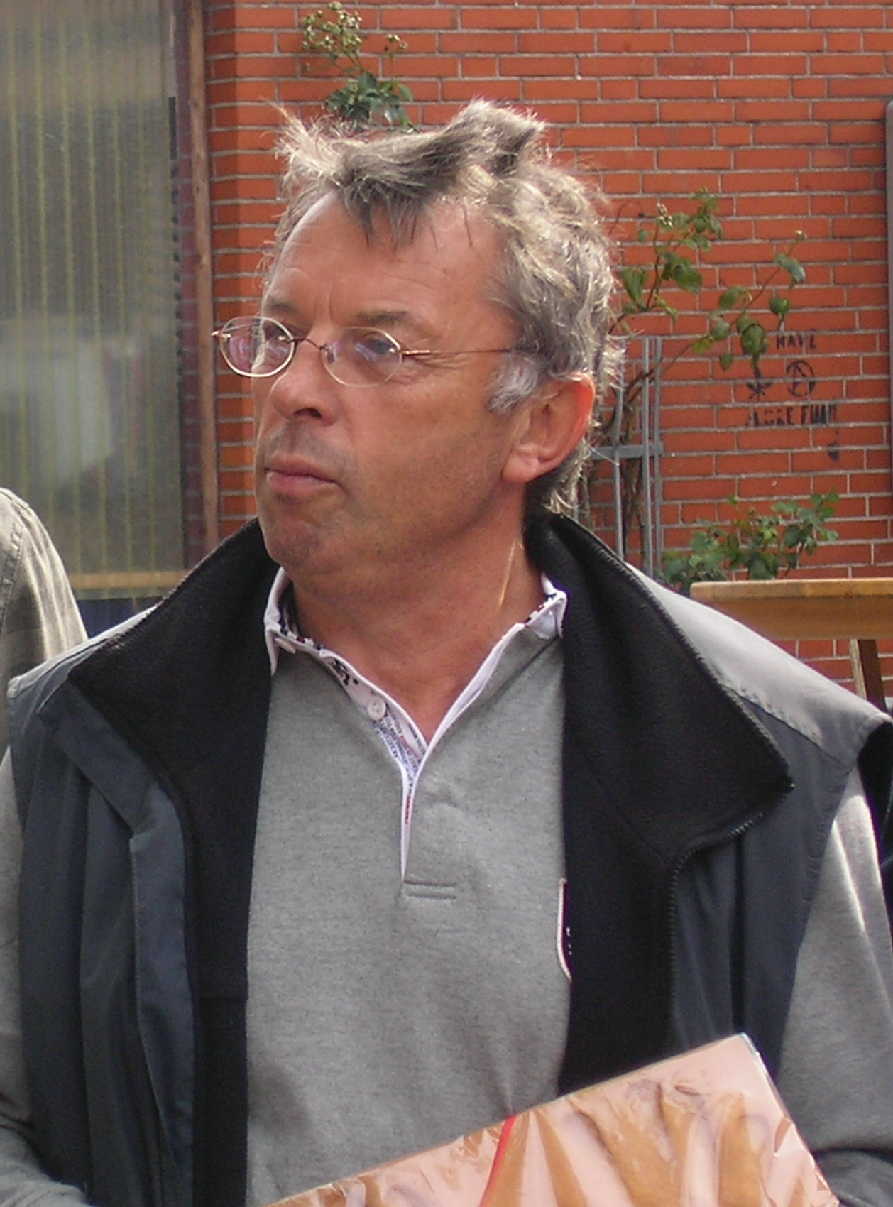 Klaus Senger.